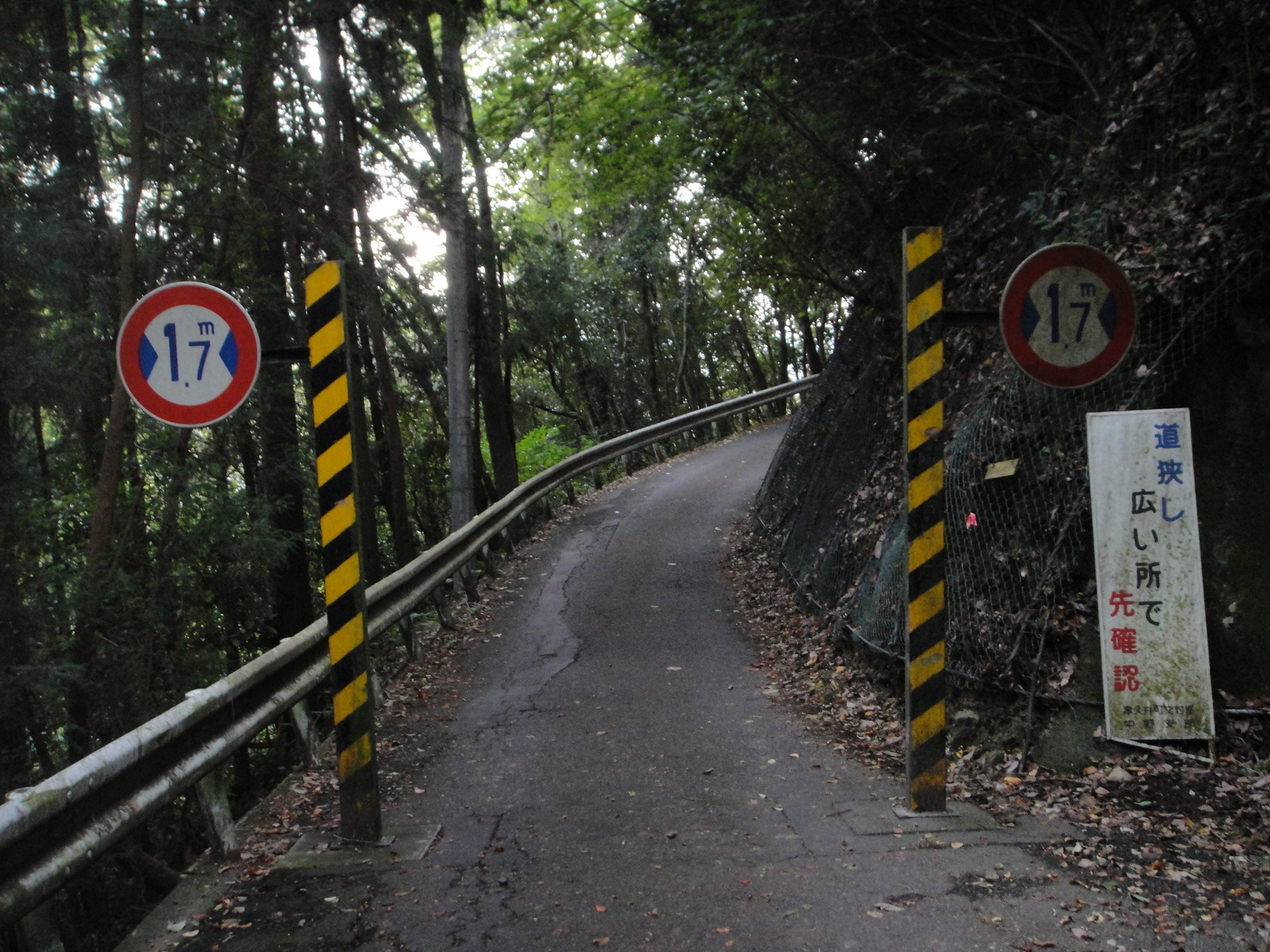 神奈川県道515号のゲート